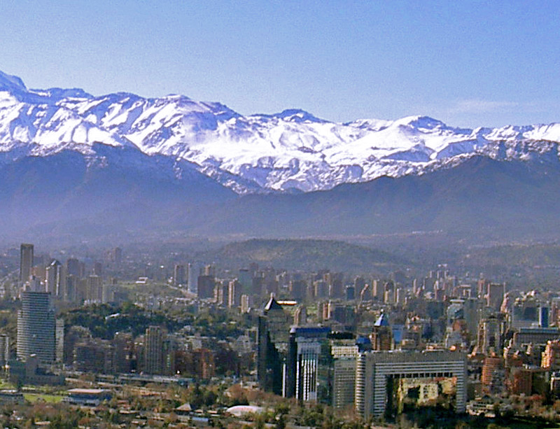 Aufnahme im Winter 2003 ca. 1 Stunde nach ergiebigen Niederschlägen gegen Mittag. Ansicht der Zentralanden bei Santiago de Chile mit Blick in Richtung der Skigebiete "La Parva", "El Colorado" (Bildmitte) und "Valle Nevado". Im Vordergrund der Stadtteil "Providencia", dahinter "Las Condes". Fotostandort: Cerro San Cristobal im Zentrum der Stadt (ca. 900 M ü. NN). Entfernung bis zur ersten, schneefreien Gebirgskette ca. 8km (Schneegrenze ca. 2000M ü. NN).